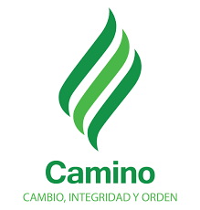 Logo del Movimiento Camino 2019